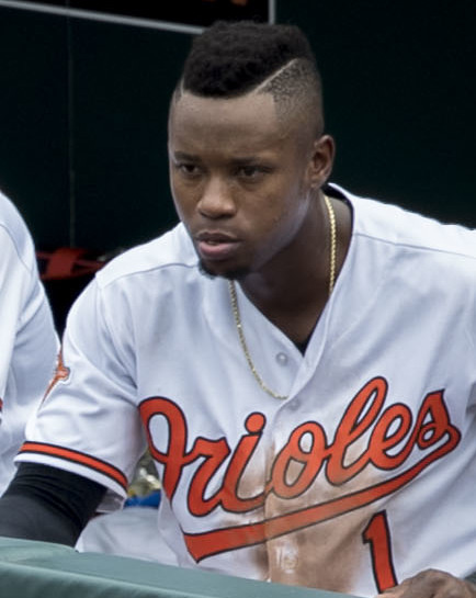 Tigers at Orioles 8/6/17